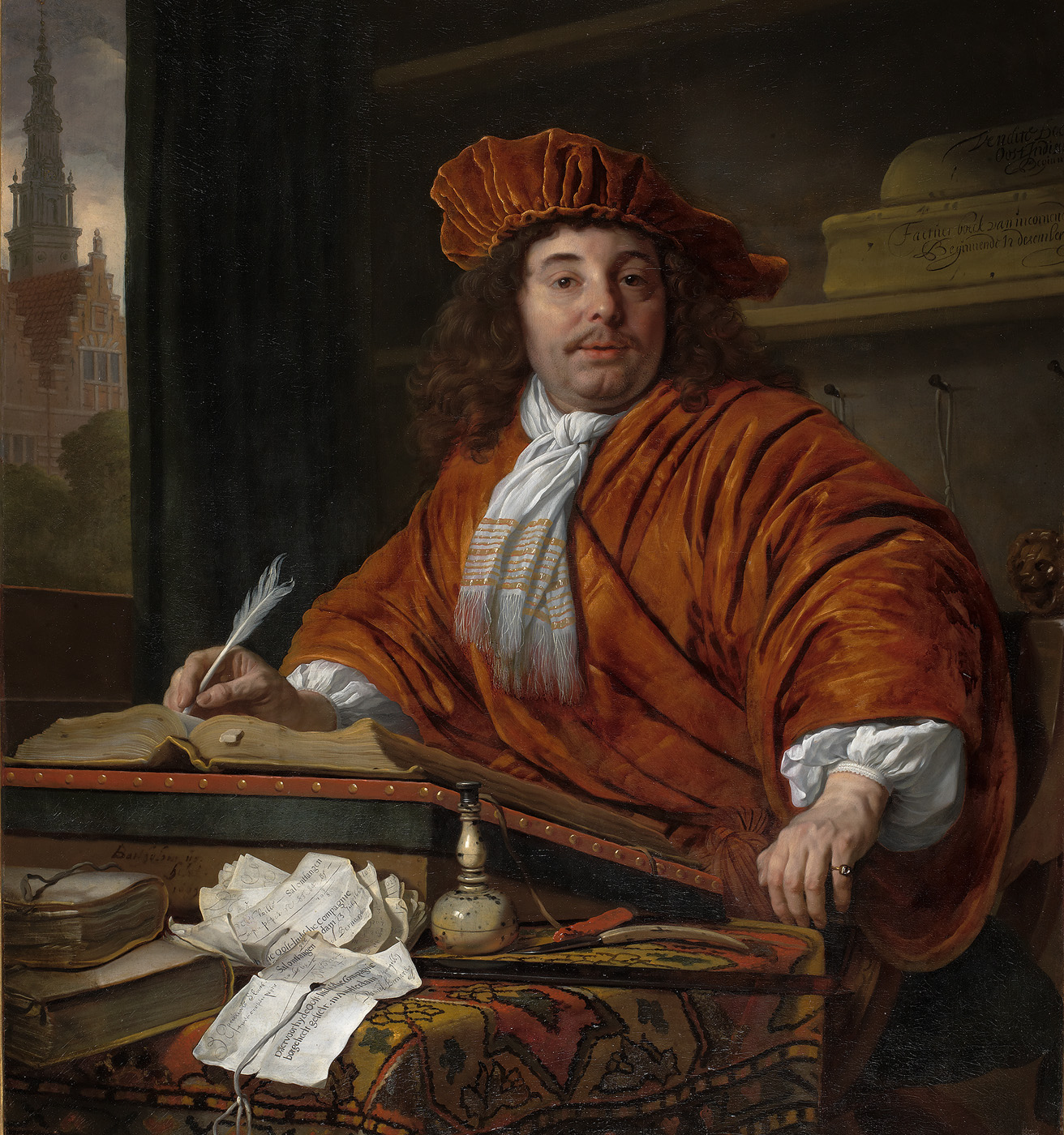 schilderij; Verenigde Oostindische Compagnie; mansportret